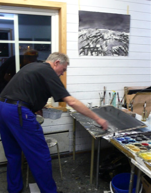 Morten Paulsen i arbeid med en av sine akvareller i Svolvær 2008. Foto: Morten W. Gjul